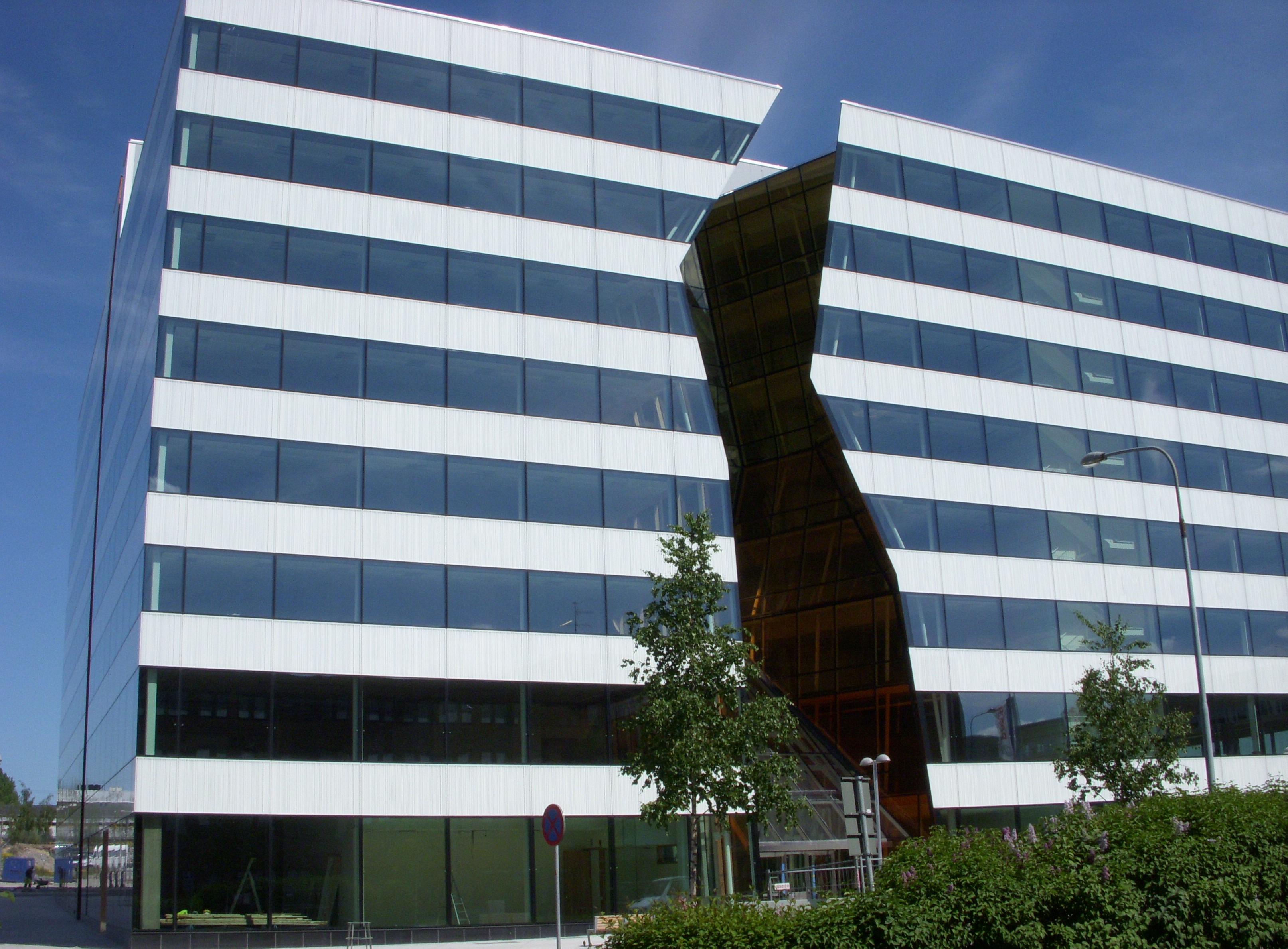 Kontorsbyggnad "Ericsson Kista"